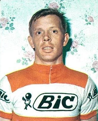 Figurina Campioni dello Sport Panini 1968-69 n.190 "A.Den Hartog"